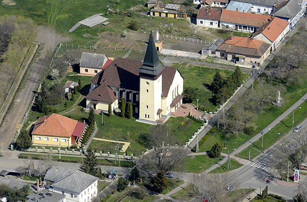 Légi fotó Püspökladányi római katolikus templomról, magyaros-szecessziós, 1921. Medgyaszay István. This is a photo of a monument in Hungary. Identifier: 5385